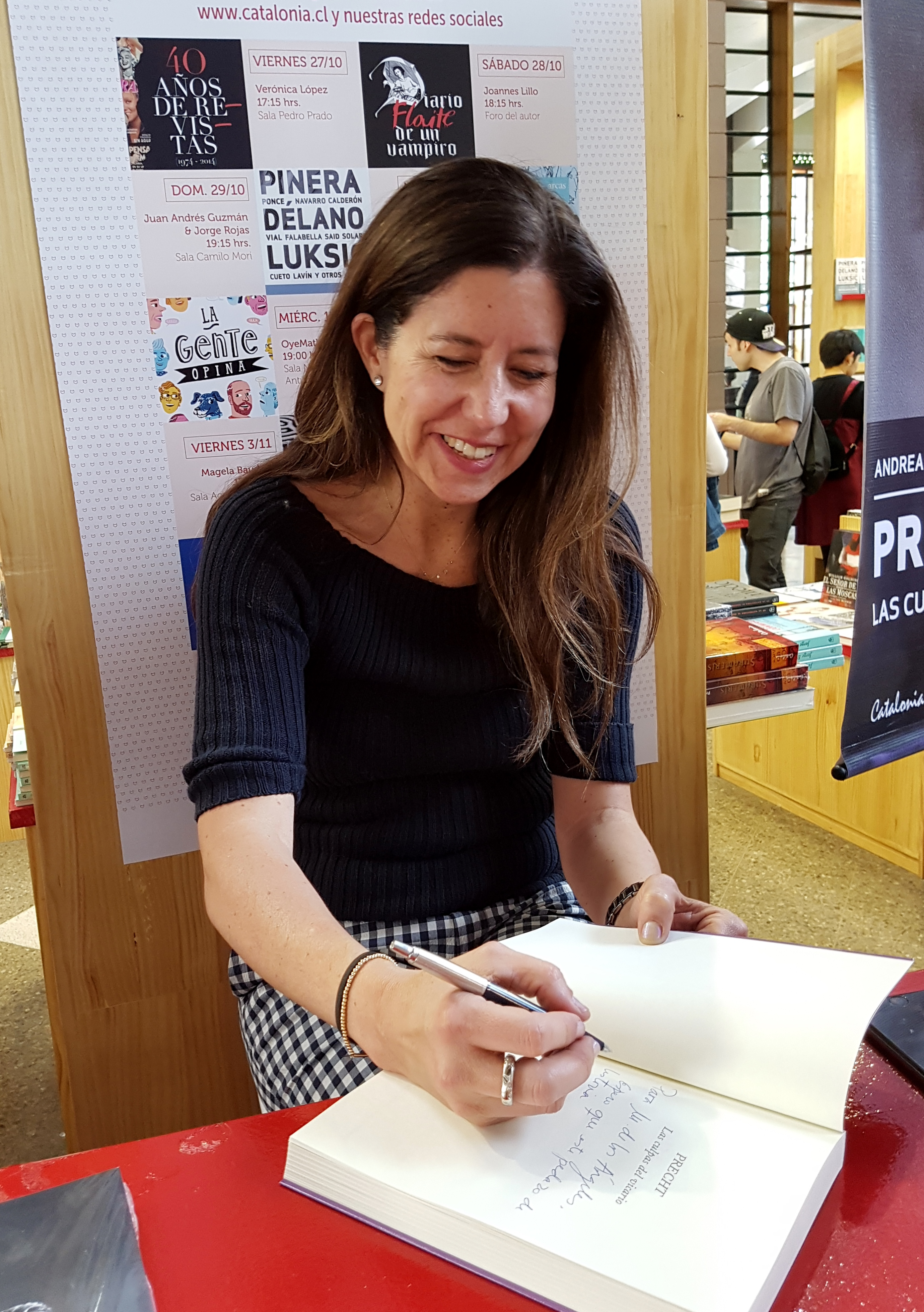 La periodista chilena Andrea Lagos en la Feria Internacional del Libro de Santiago 2017.